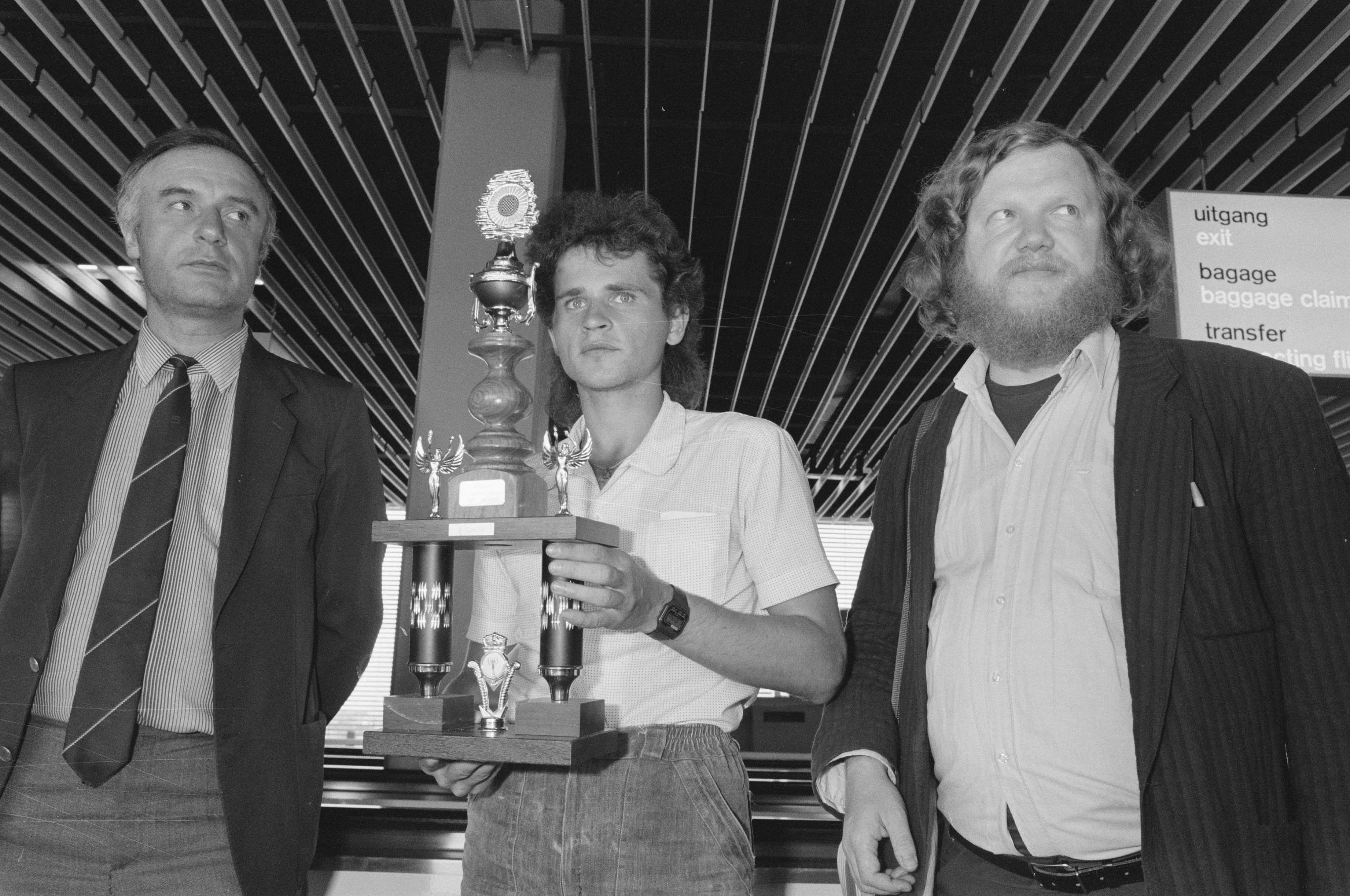 Nederlandse en Russische damploeg terug na WK in Suriname v.l.n.r. Gantwary (2e), Tsjitjov (1e) en Sijbrands (ook 2e) op Schiphol